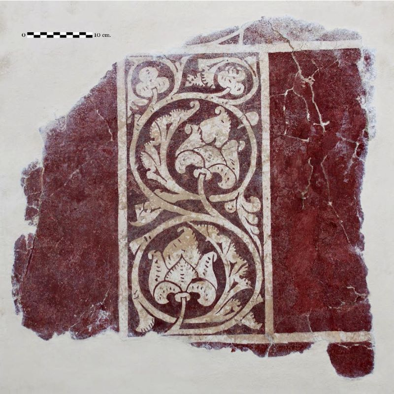 Fragmento de estuco localizado en la Alcazaba de Almería. Museo de Almería